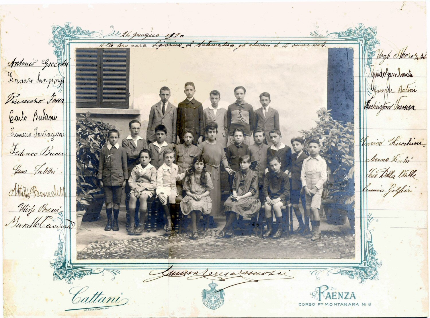 Liceo Torricelli Faenza Classe 3 ginnasio 1919-20